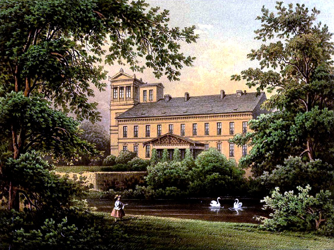 Schloss Oppin, Lithografie aus dem 19. Jahrhundert